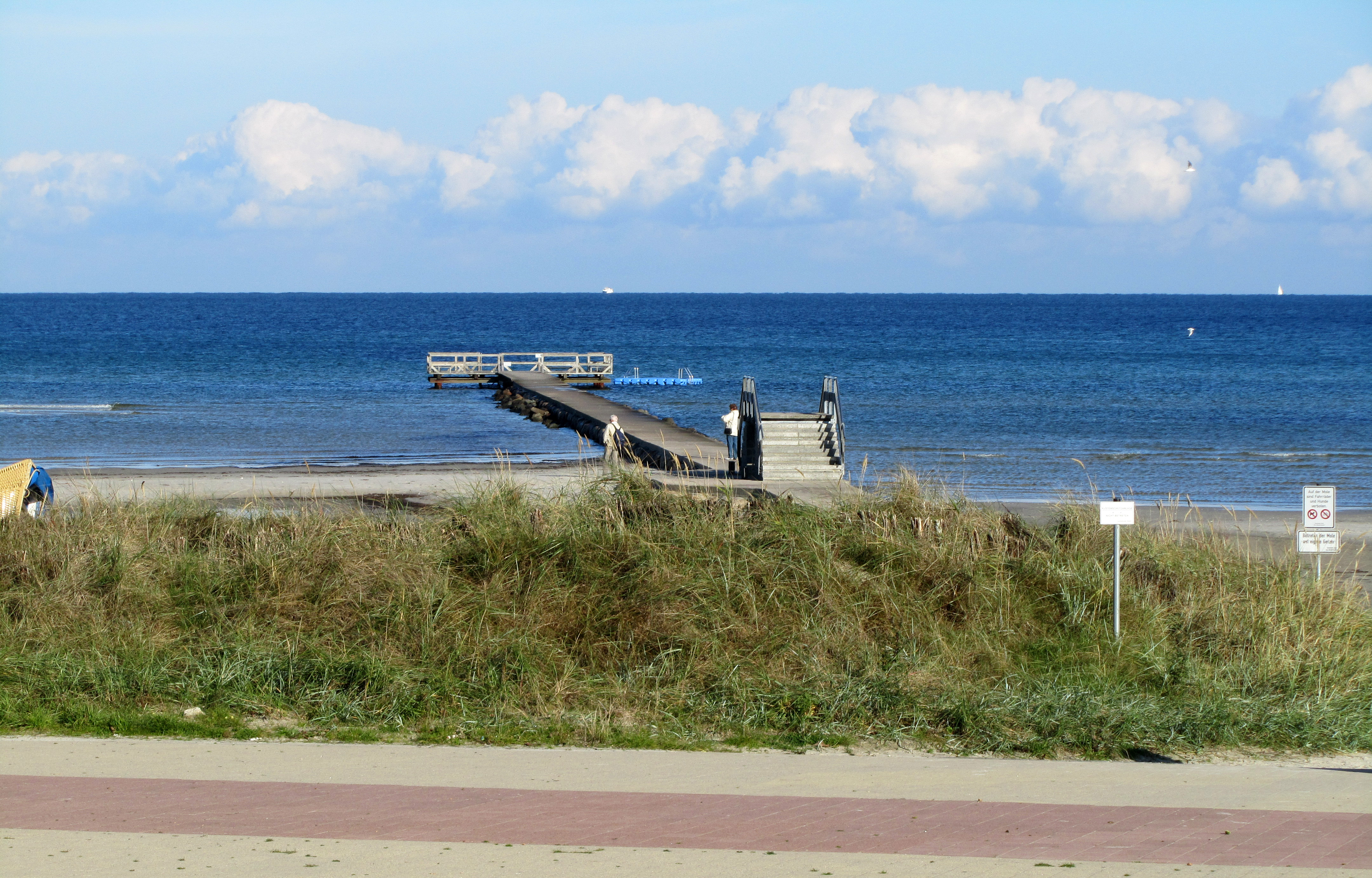 Mole in Stein